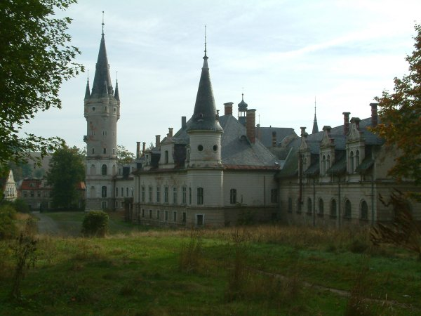 Pałac w Bożkowie, fot. Leszek Kościński